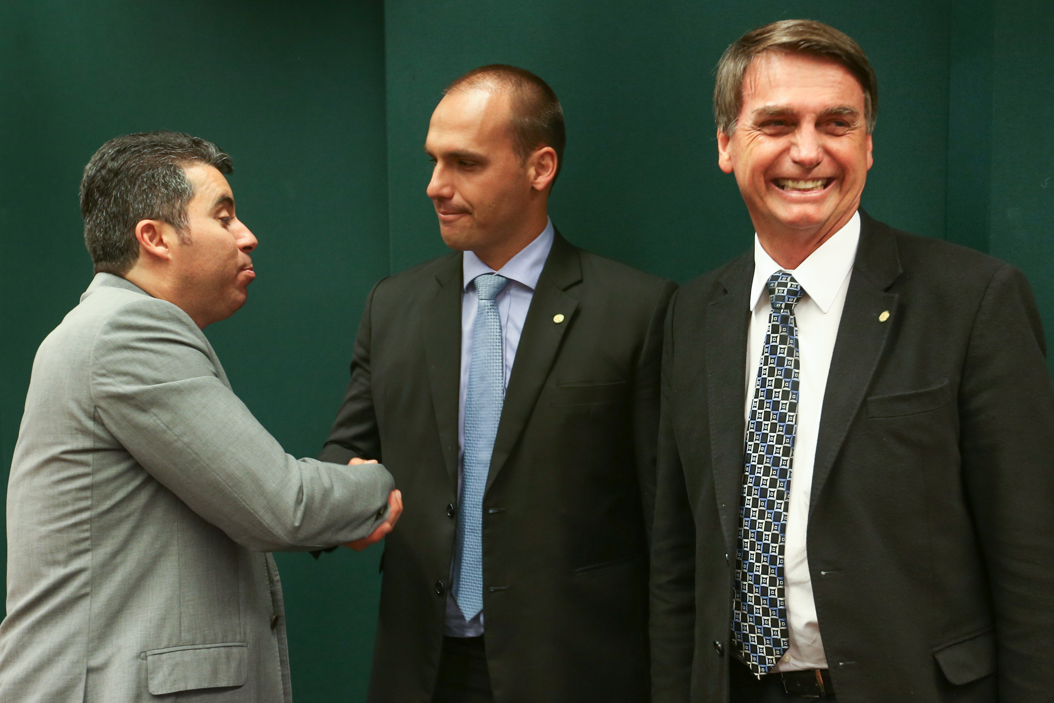 Brasília - O deputado Marcos Rogério cumprimenta Eduardo Bolsonaro ao lado de Jair Bolsonaro após o Conselho de Ética arquivar duas representações (12/17 e 13/17) contra Eduardo (Fabio Rodrigues Pozzebom/ Agencia Brasil).